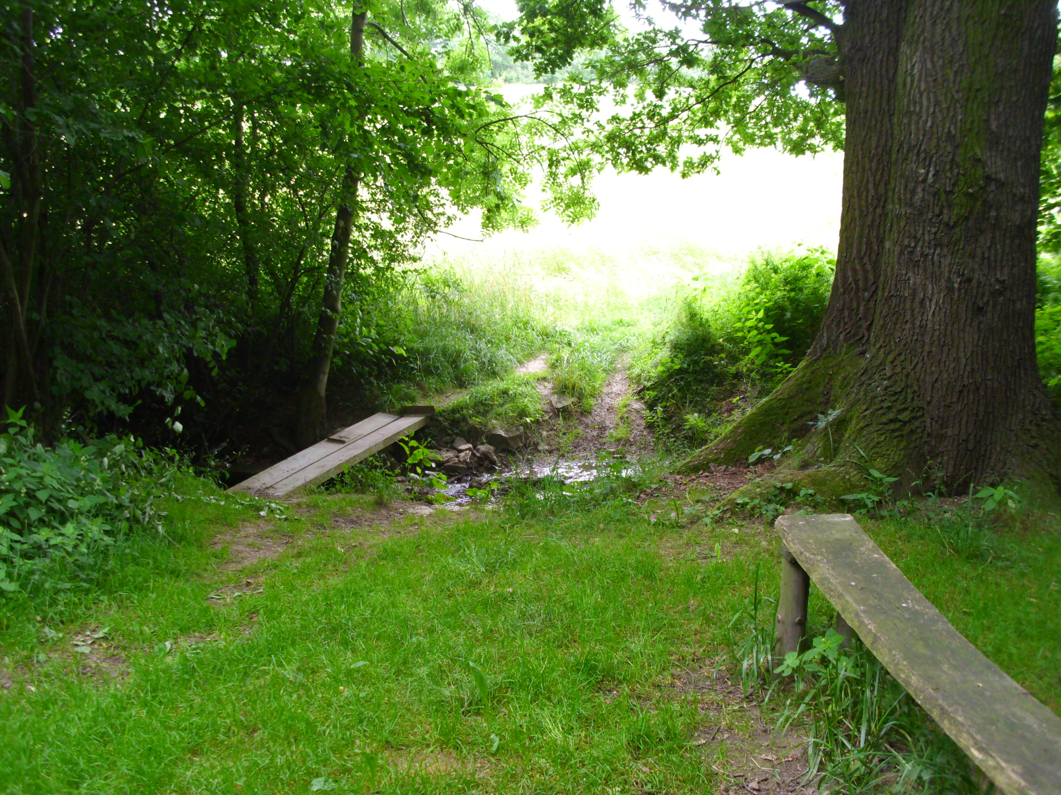 Der ehemalige Brückenplatz im Schwarzbachtal bei Dippoldiswalde: Hier bestand einst die Brücke der Alten Osterzgebirgischen Poststraße.